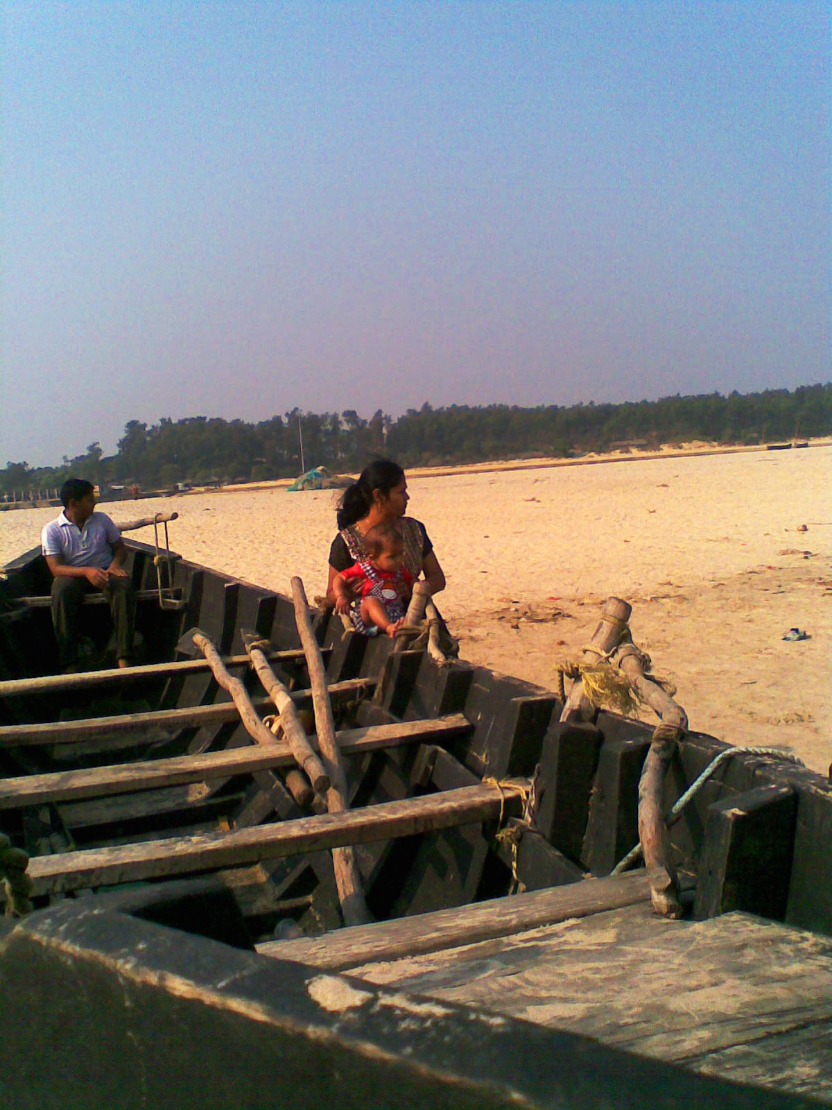 Talasari beach,Baleswsar, Odisha